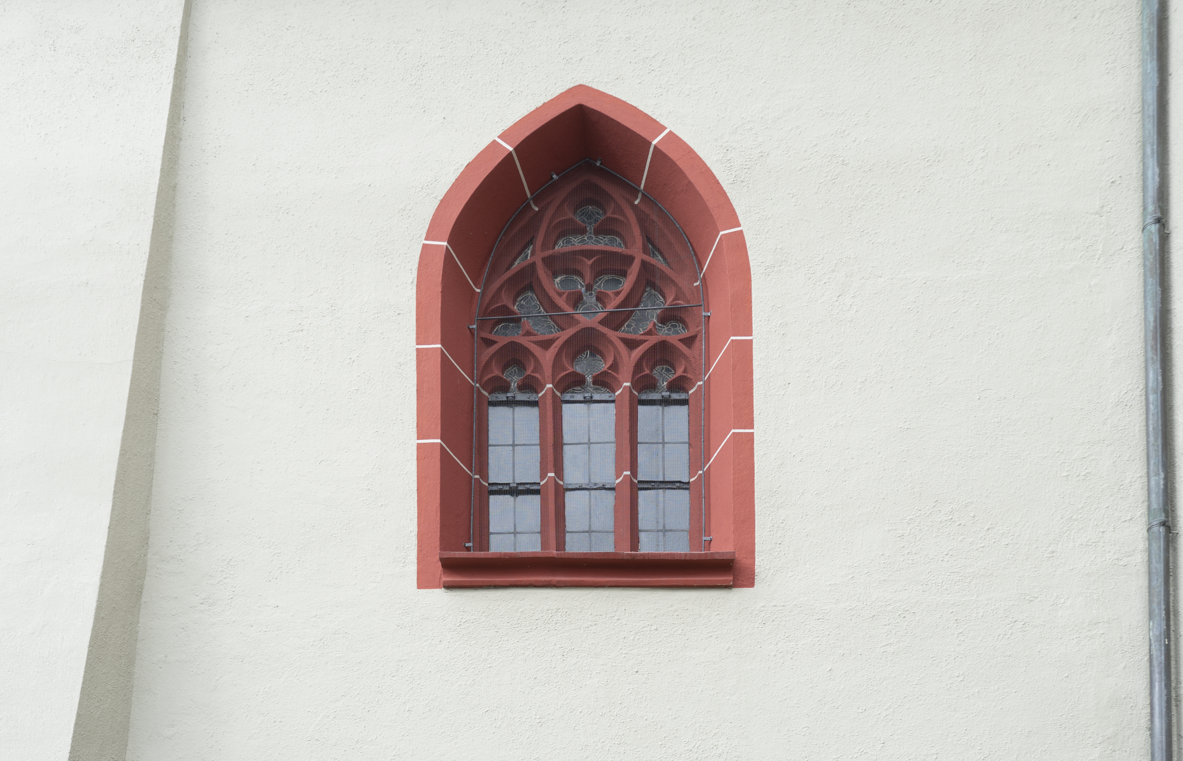 Fenster über Unterführung Michaeliskirche Hof (südlich von Kirche). Vor dem Fensterglas ist eine Schutzvorrichtung eingebaut (sogenanntes Netz).